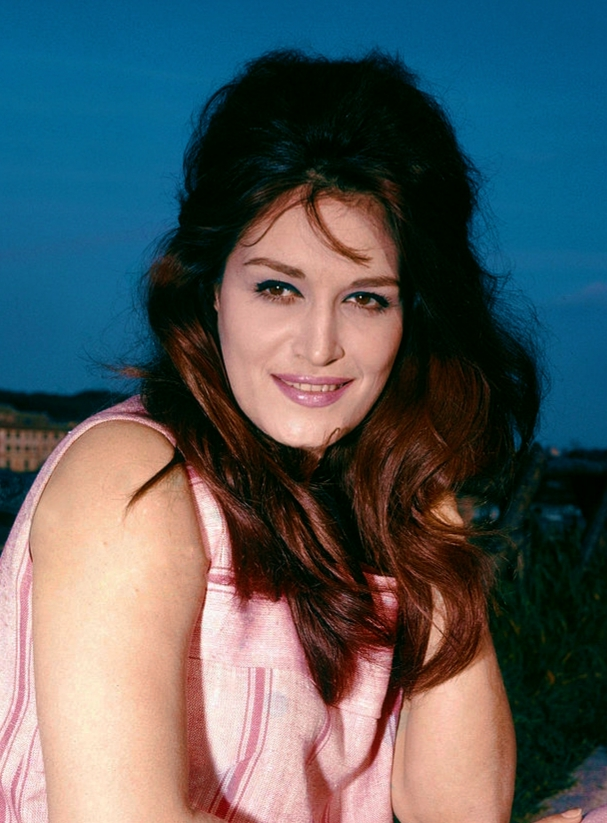 Dalida